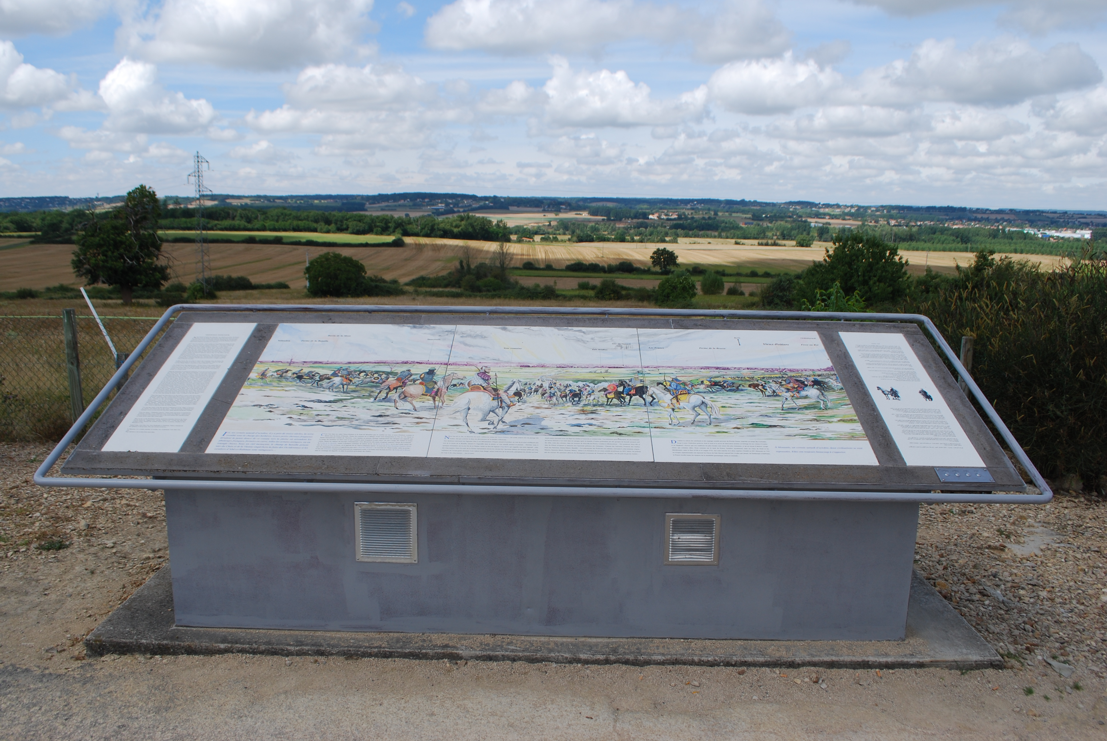 الموقع المحتمل لمعركة بلاط الشهداء